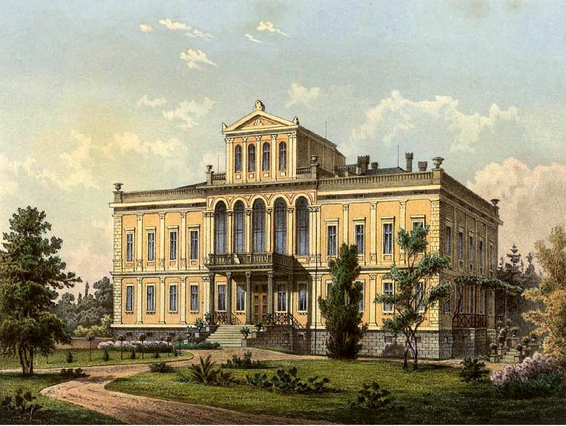 Rittergut Nieder Schönbrunn, Kreis Lauban, Provinz Schlesien, Lithografie aus dem 19. Jahrhundert